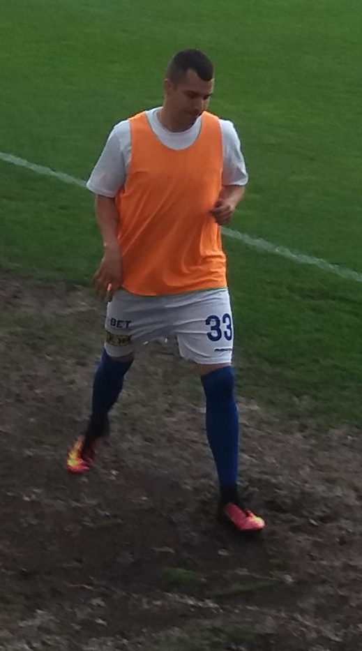 Slaven Jurisa - Motor Lublin 2017